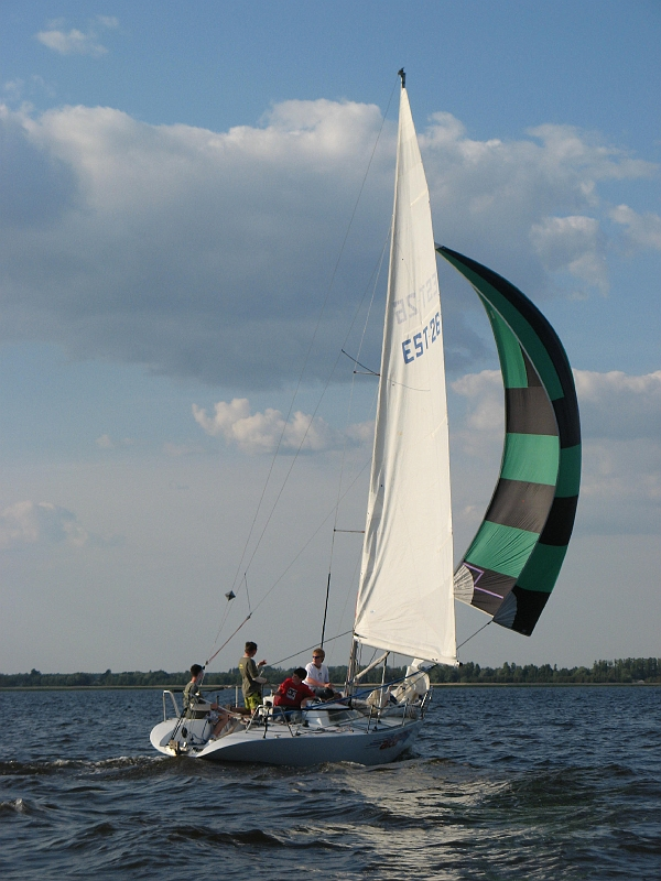 Purjekas sõitmas allatuult